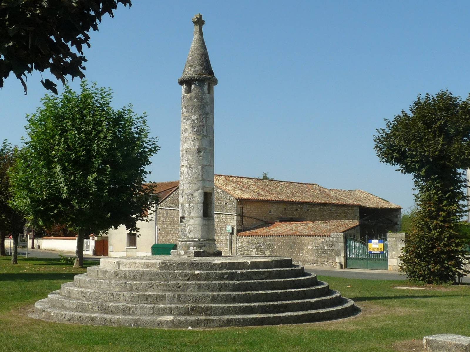 lanterne des morts de Pranzac (16), France